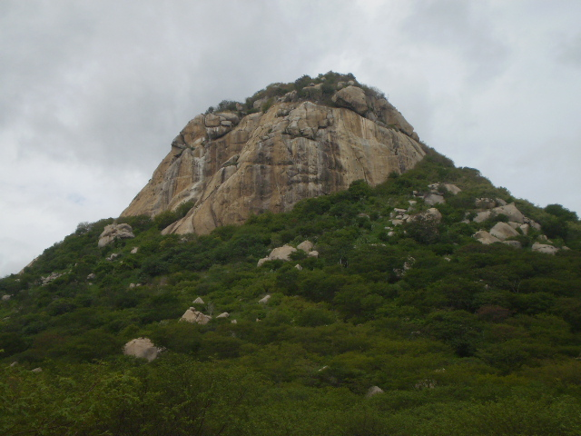 Praça e Igreja Santa Teresinha